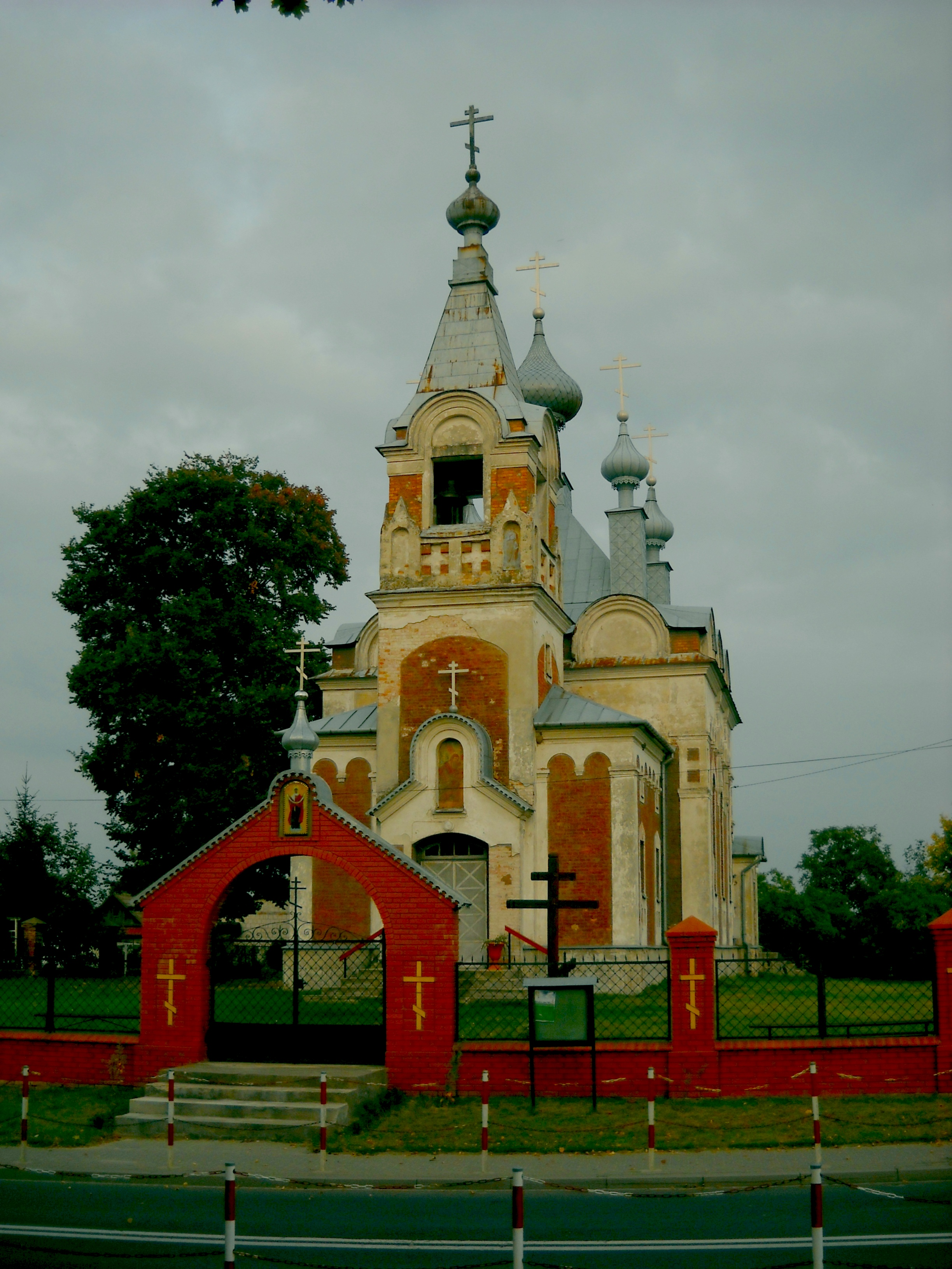 Cerkiew w Sławatyczach